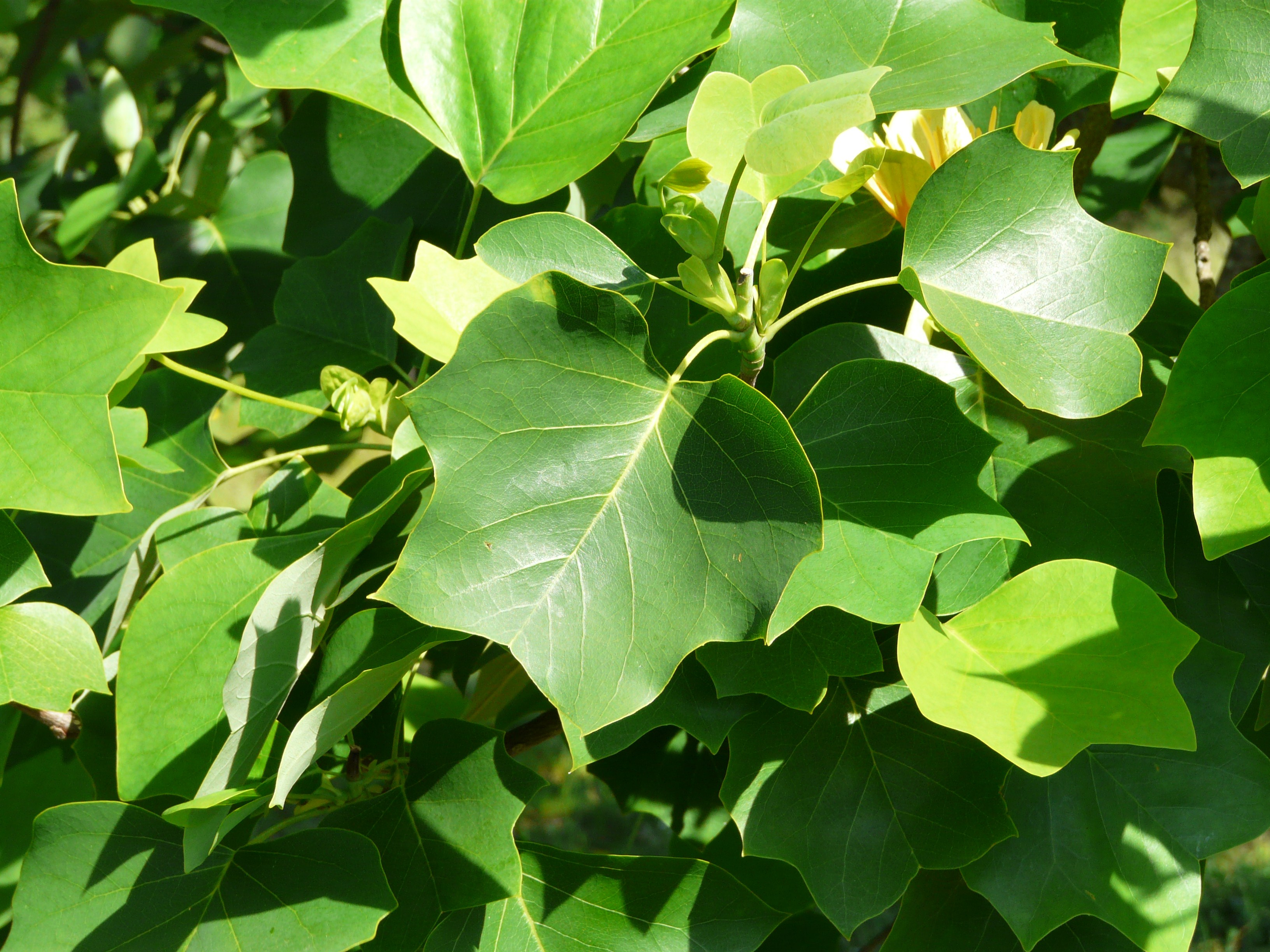 Feuilles de tulipier de Virginie (Liriodendron tulipifera), arboretum du Puy de Chadon, Gimel-les-Cascades, Corrèze, France